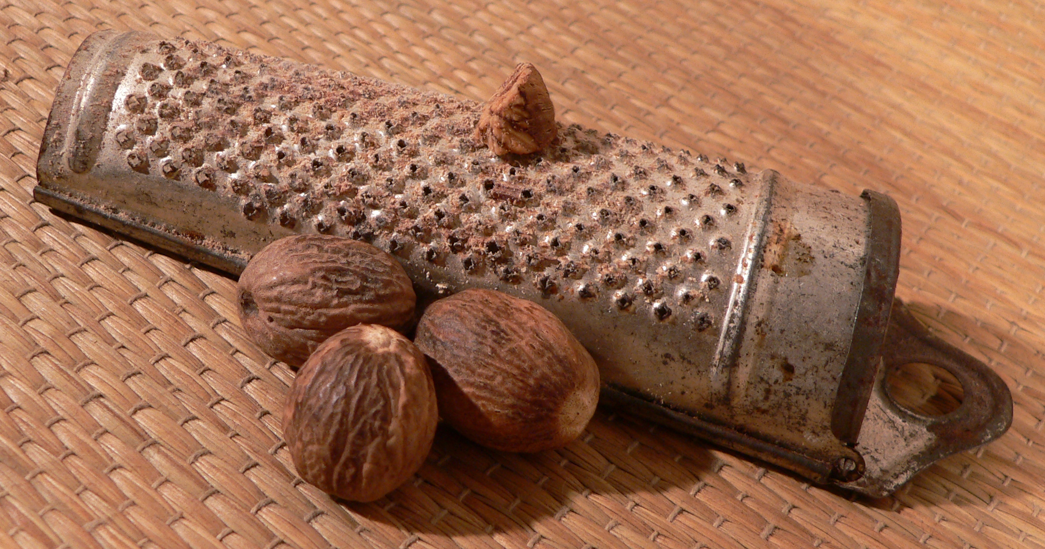 Muskatreibe mit Muskatnüssen